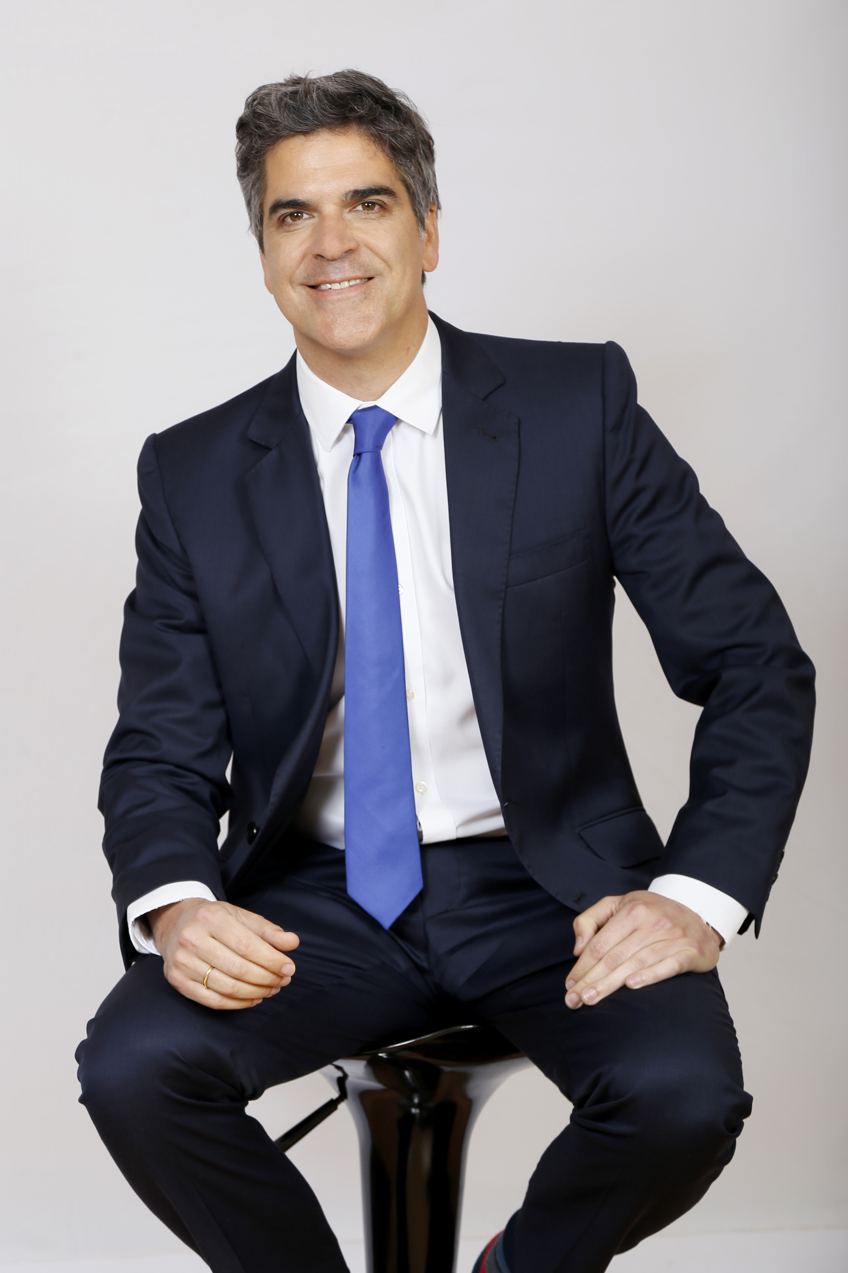 Foto oficial del H. Diputado Gonzalo Fuenzalida